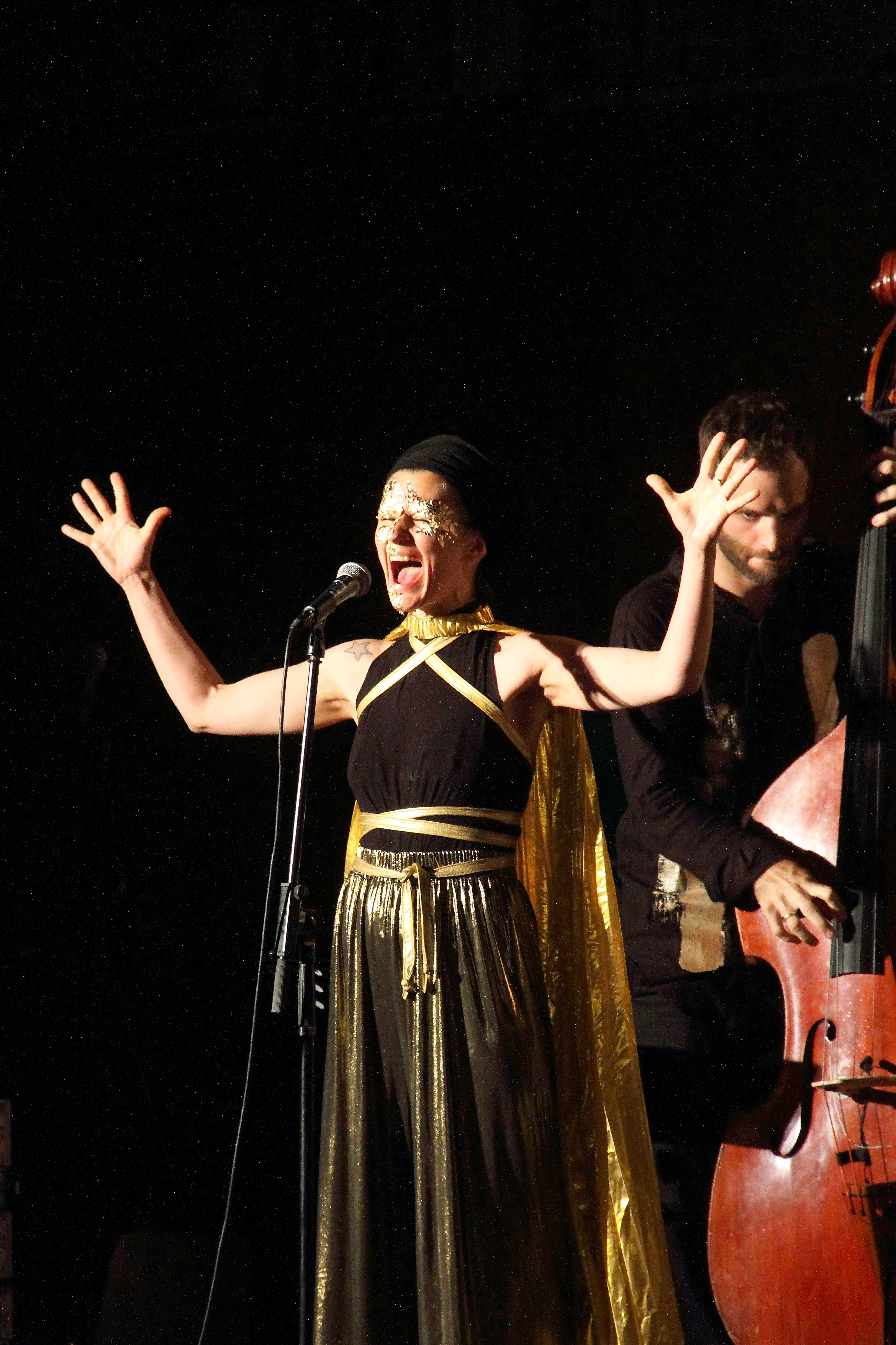 Shake Stew unter der Leitung von Lukas Kranzelbinder auf dem INNtöne Jazzfestival 2017.